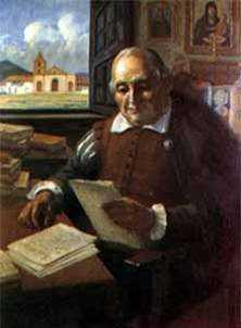 Juan Rodriguez Frayle